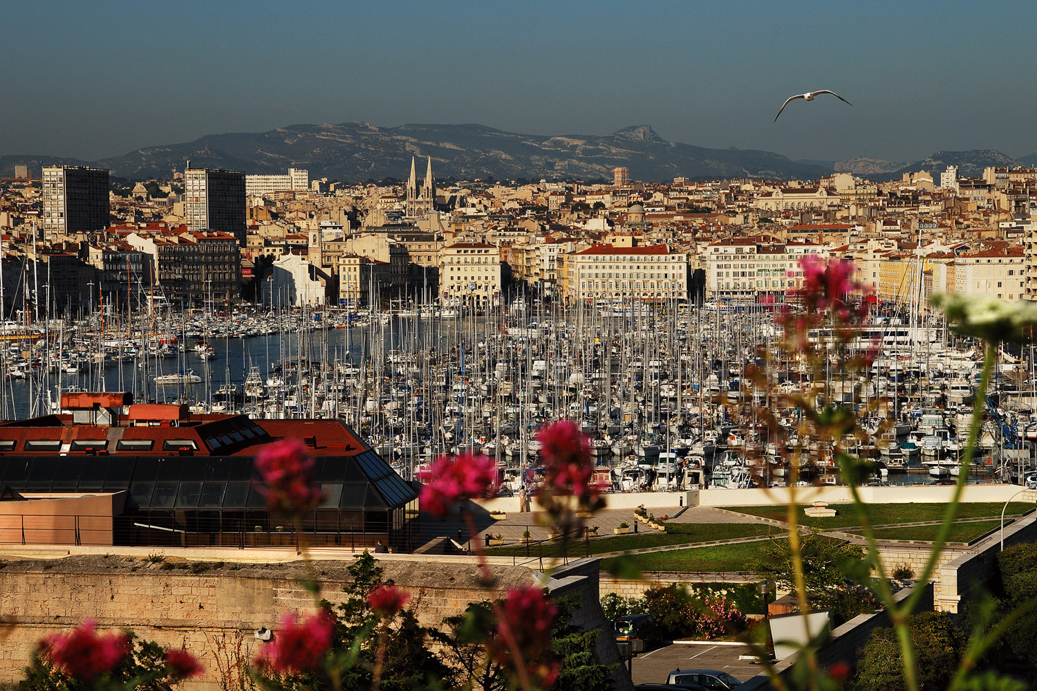 Марсель, Франция. Вид на Старый порт и Храм Винсента-де-Поля